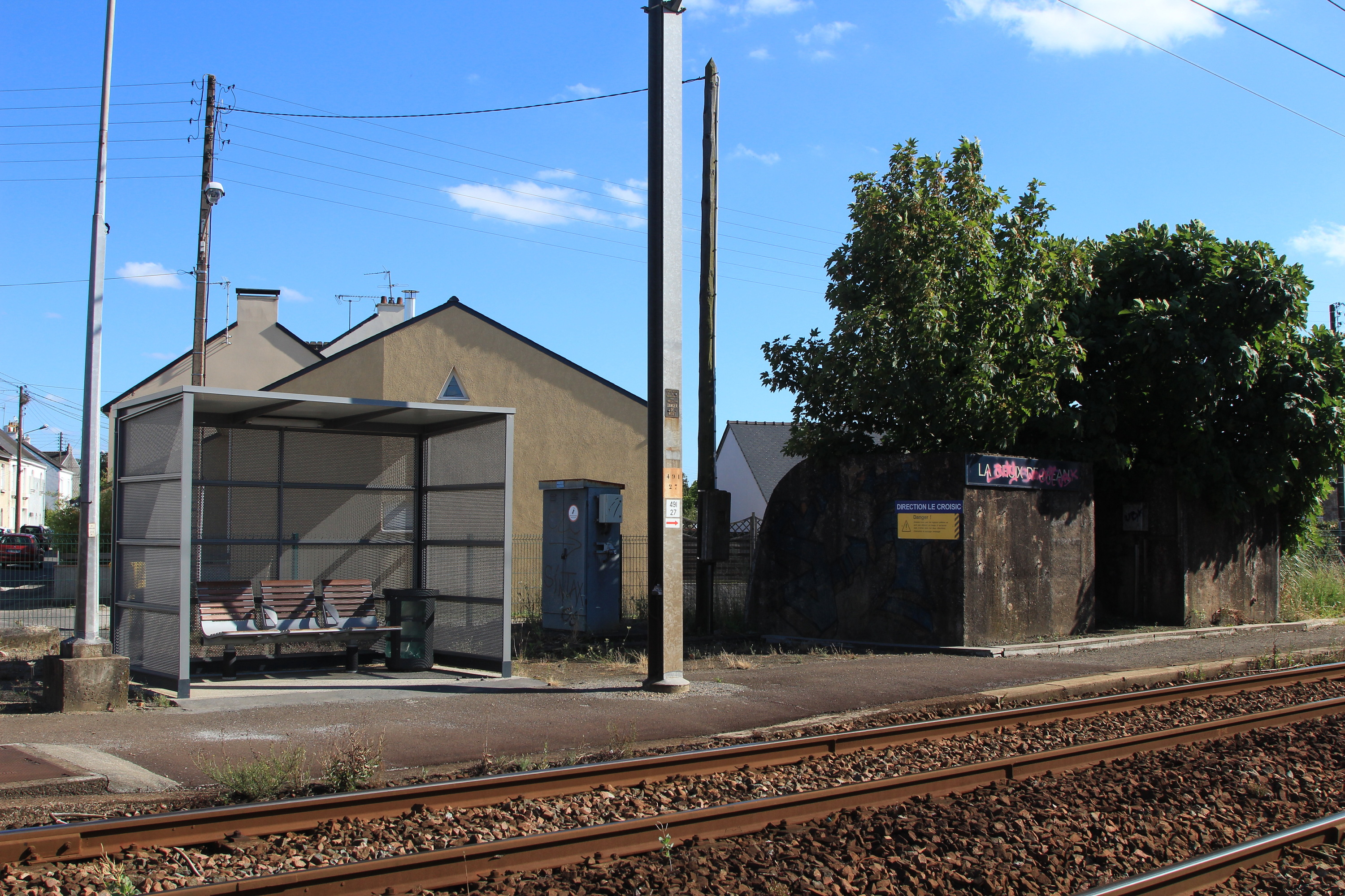 Abris et quai direction Le Croisic de la petite halte de La Croix-de-Méan à Saint-Nazaire.